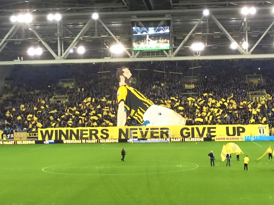 Goeram Kasjia sfeeractie